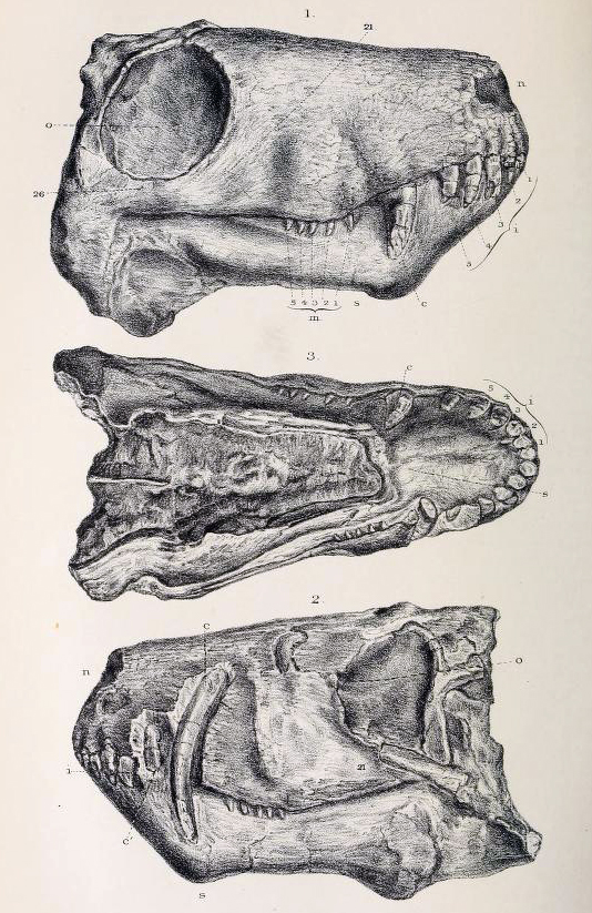 Aelurosaurus felinus holotype skull.